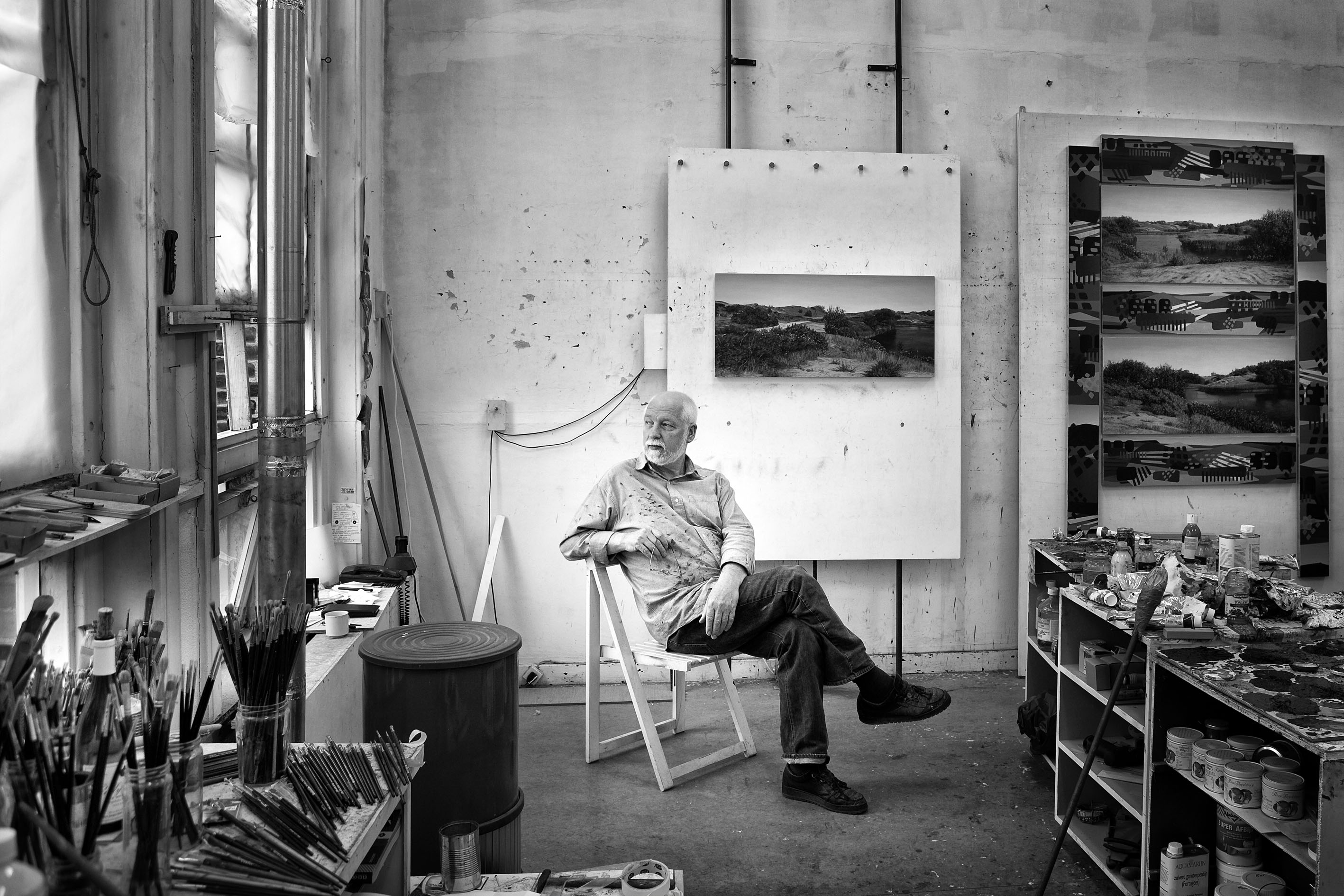 zwartwit foto van kunstenaar Jaap van den Ende zittend in zijn atelier, voor zijn schilderijen. Links een raam, een kachel en een tafel met kwasten, rechts een tafel met tubes verf. Datum: 9-6-2011.